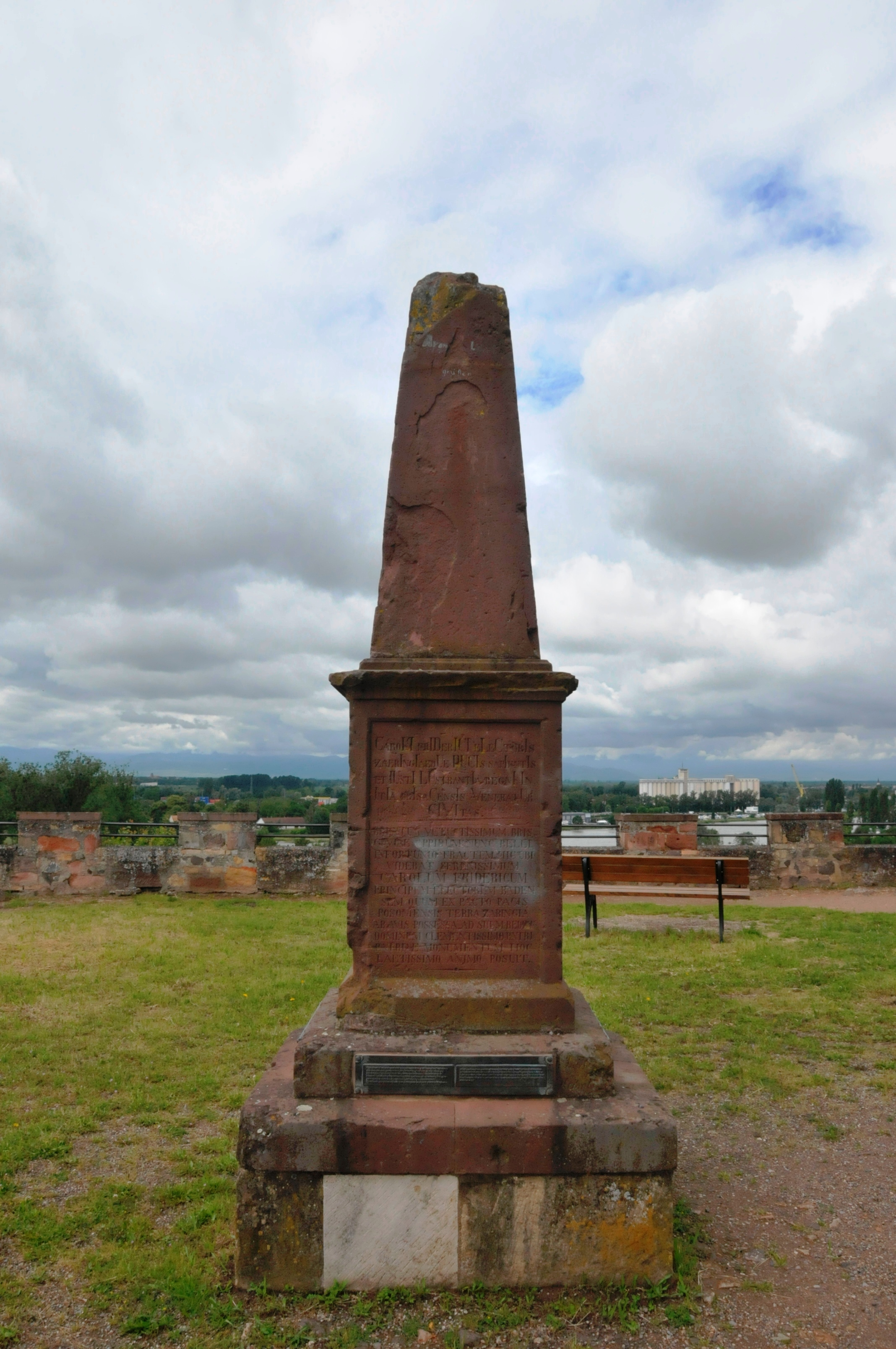 Breisach am Rhein, Eckartsberg-Obelisk